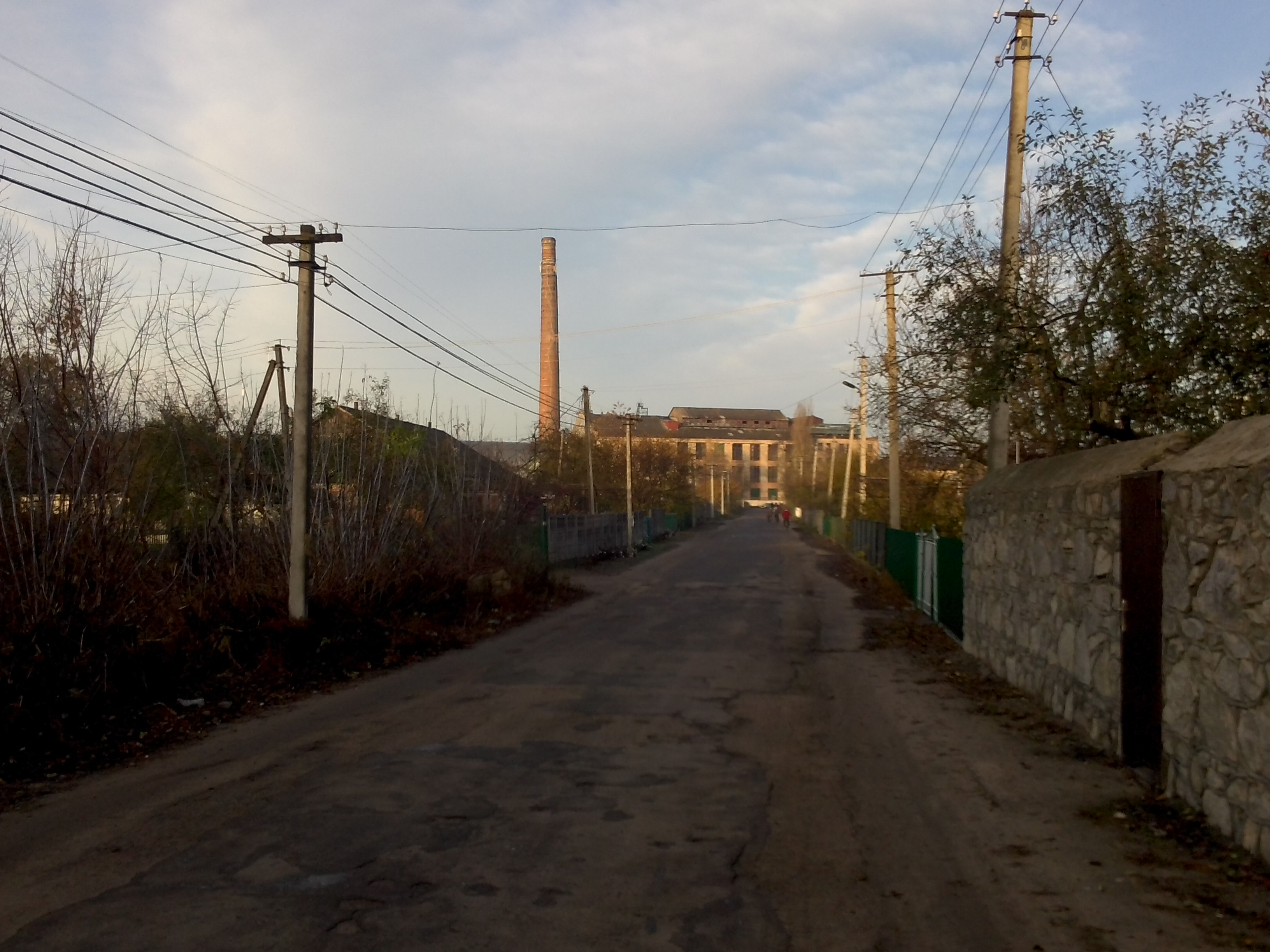 Турбівський цукровий завод